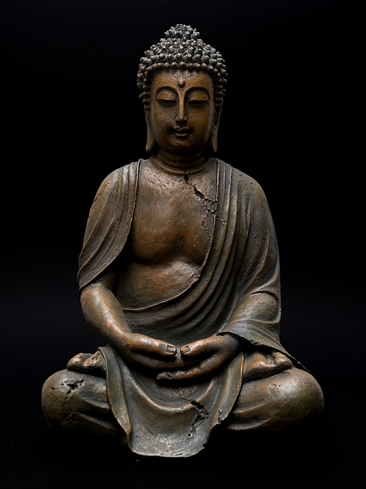 Buddha, dhyana mudra